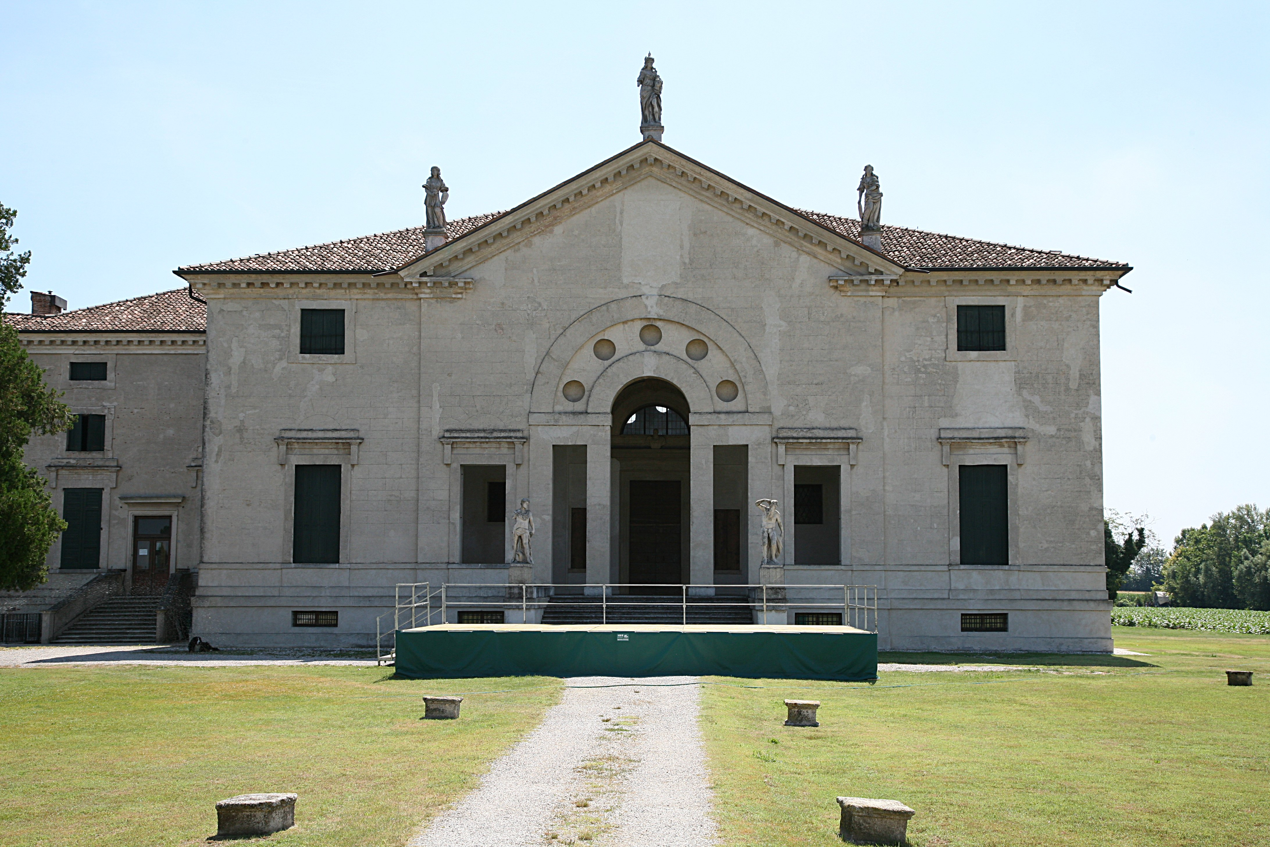 Villa Poiana at Poiana Maggiore by Andrea Palladio